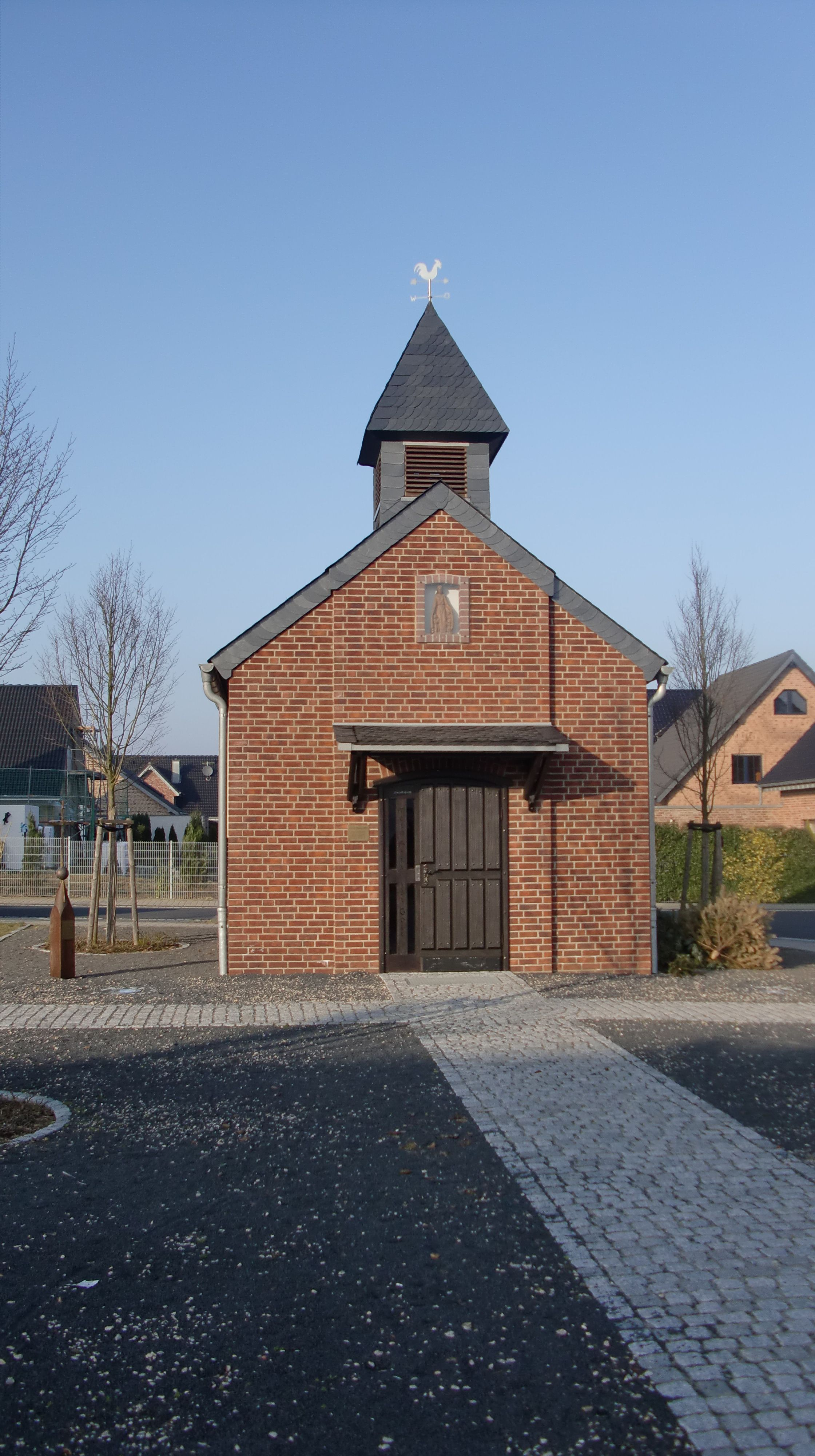 Die neue Kapelle im Dorf bildet seit 2008 den Dorfmittelpunkt, neben der Kapelle steht ein Kriegerdenkmal aus dem alten Ort.